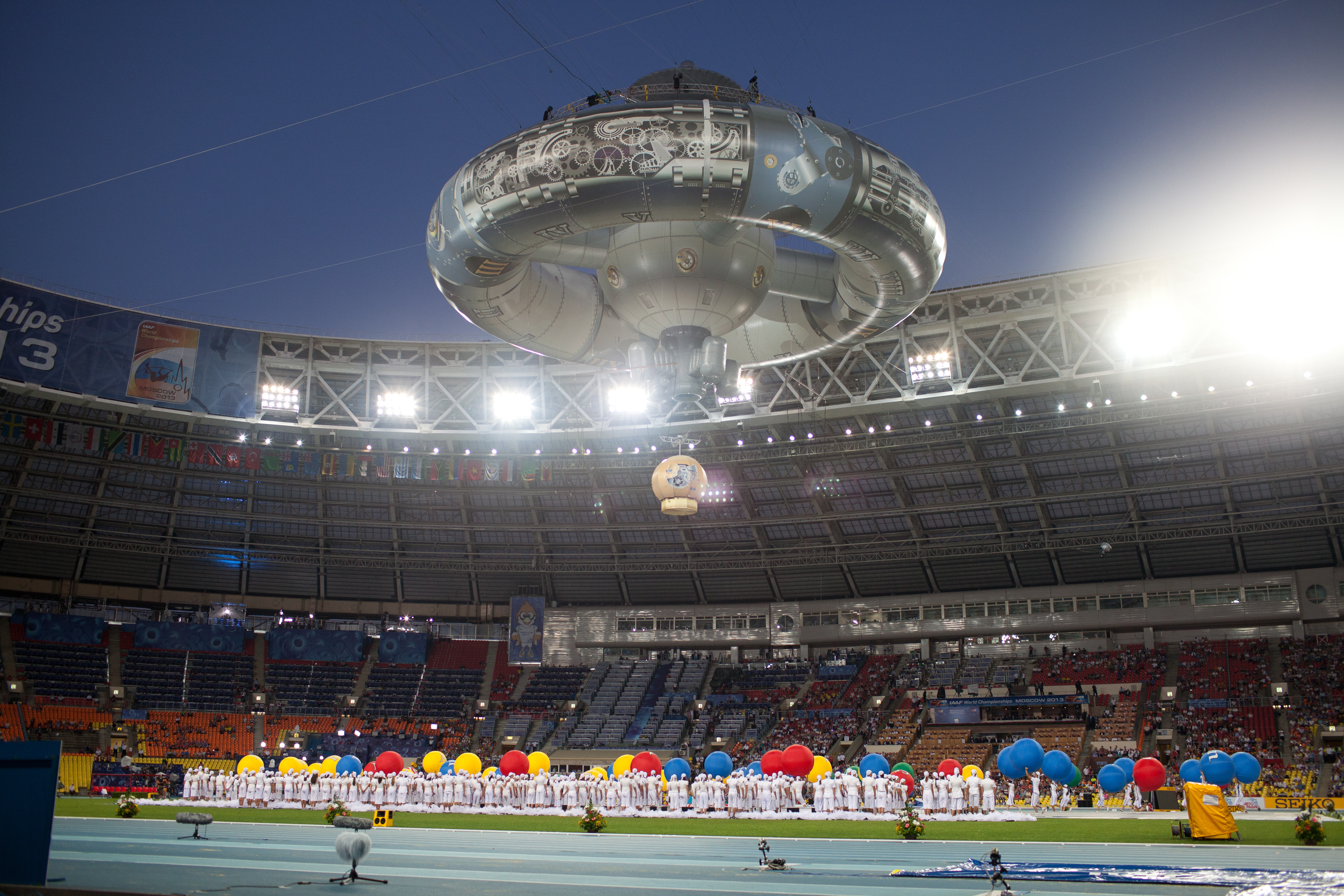 Первый день Чемпионата мира по легкой атлетике в Москве